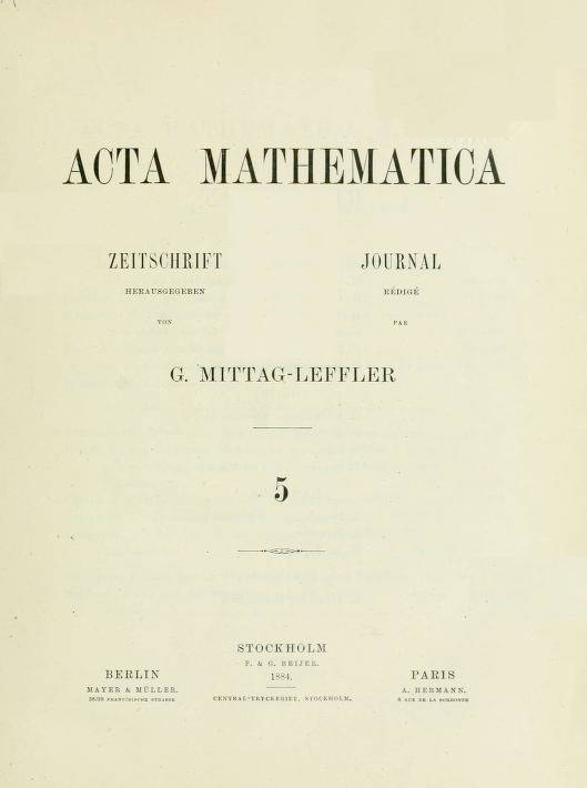 Titelseite der Zeitschrift / Title page of the periodical